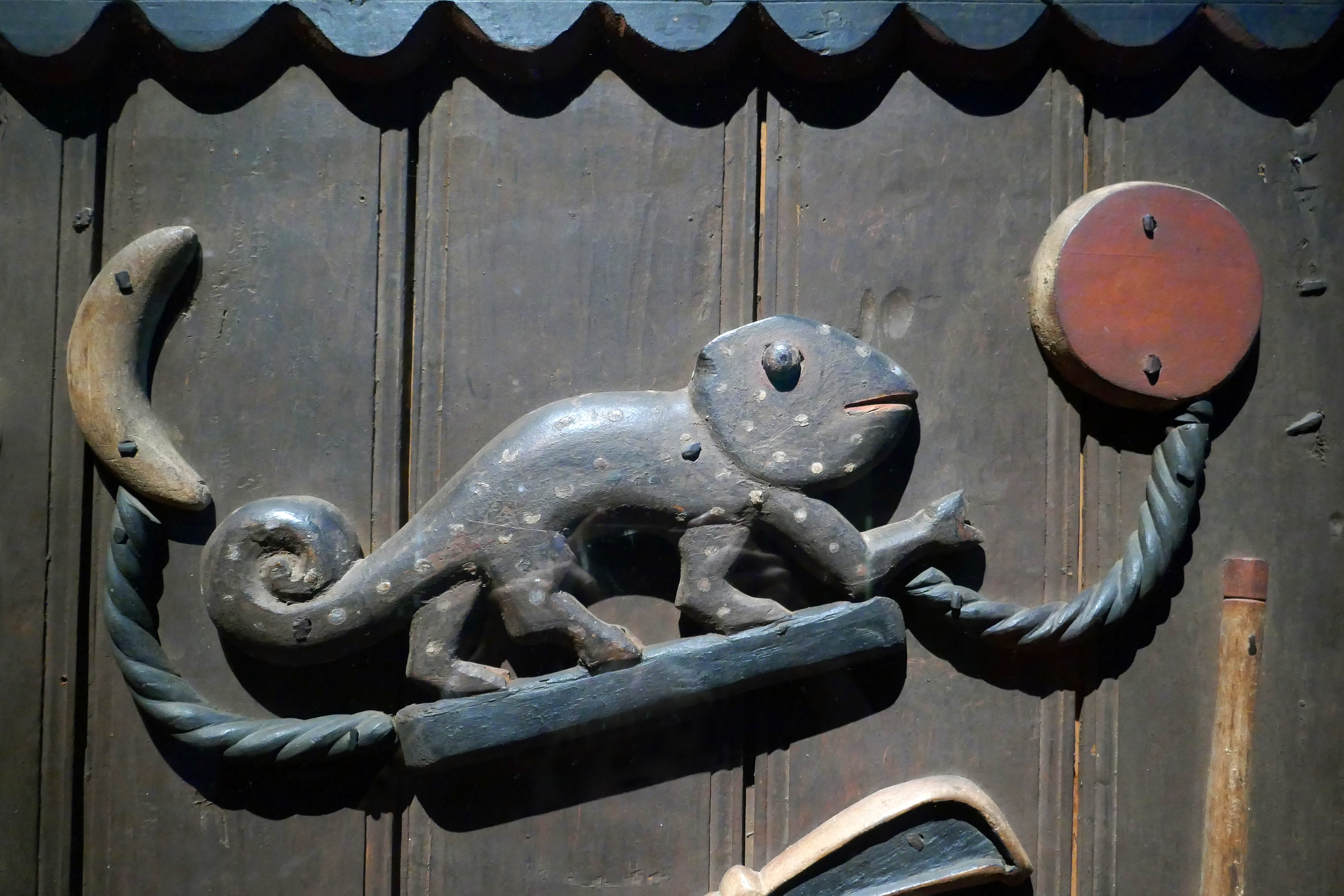 Porte du palais royal d'Abomey Atelier Sossa Dede Date : vers 1889 Bois polychrome, pigments, métal L'une des 4 portes exposées au musée du Quai Branly. N° d'inventaire : 71.1893.45.6